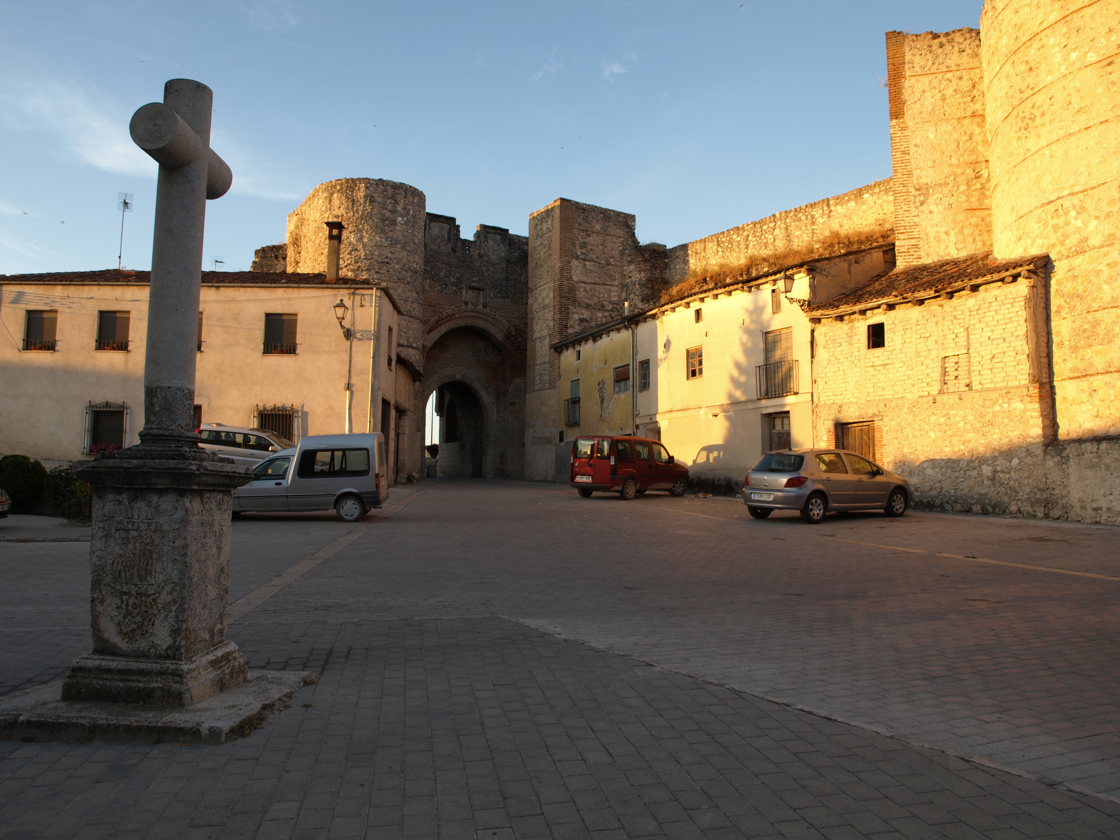 Cruz y arco de San Basilio en Cuéllar